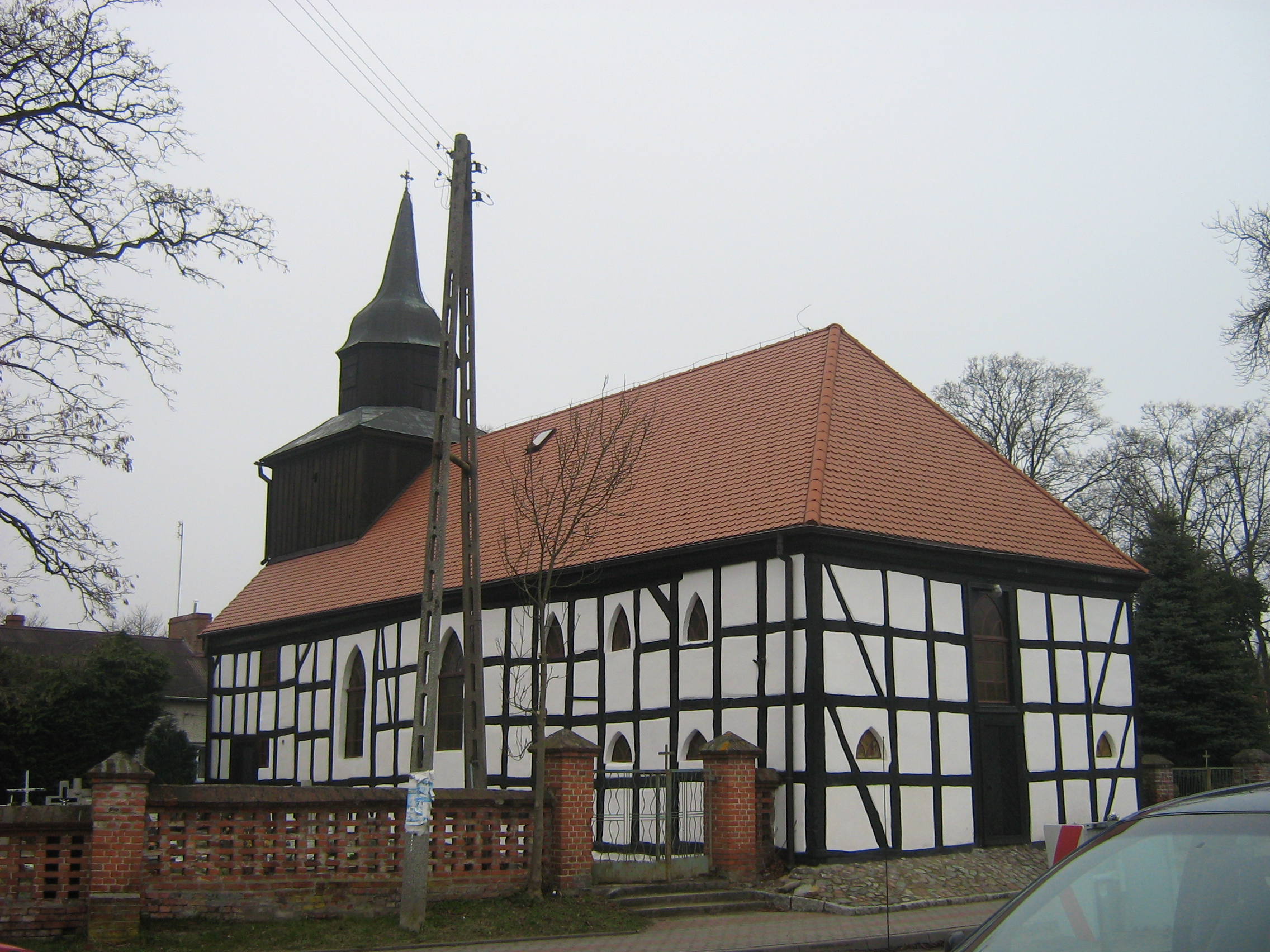 Kościół św. Trójcy w Świerznie